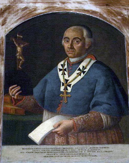 Ambito dell'Italia meridionale sec. XIX, Dipinto dell'arcivescovo Baldassarre Mormile